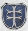 Wappen des Heilig-Geist-Ordens am Kreuzherrenkloster in Memmingen